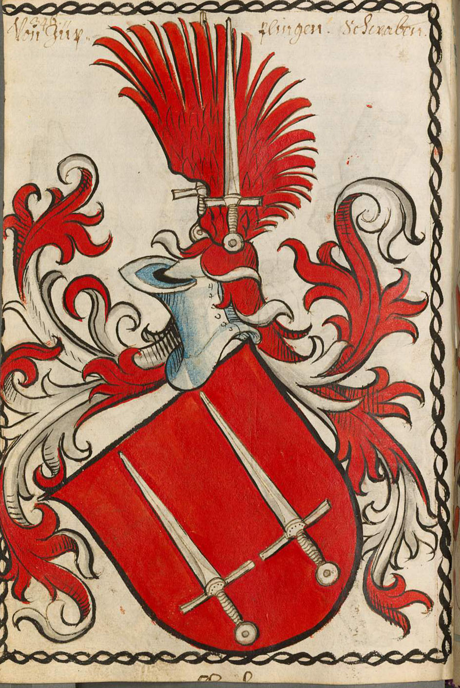 Scheibler'sches Wappenbuch, älterer Teil; Seite 346 Von Züpflingen Schwaben